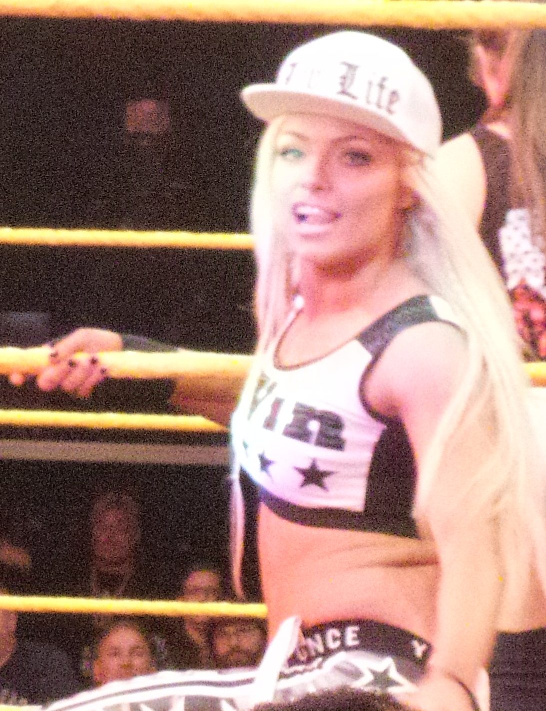 P_20170419_205754_017